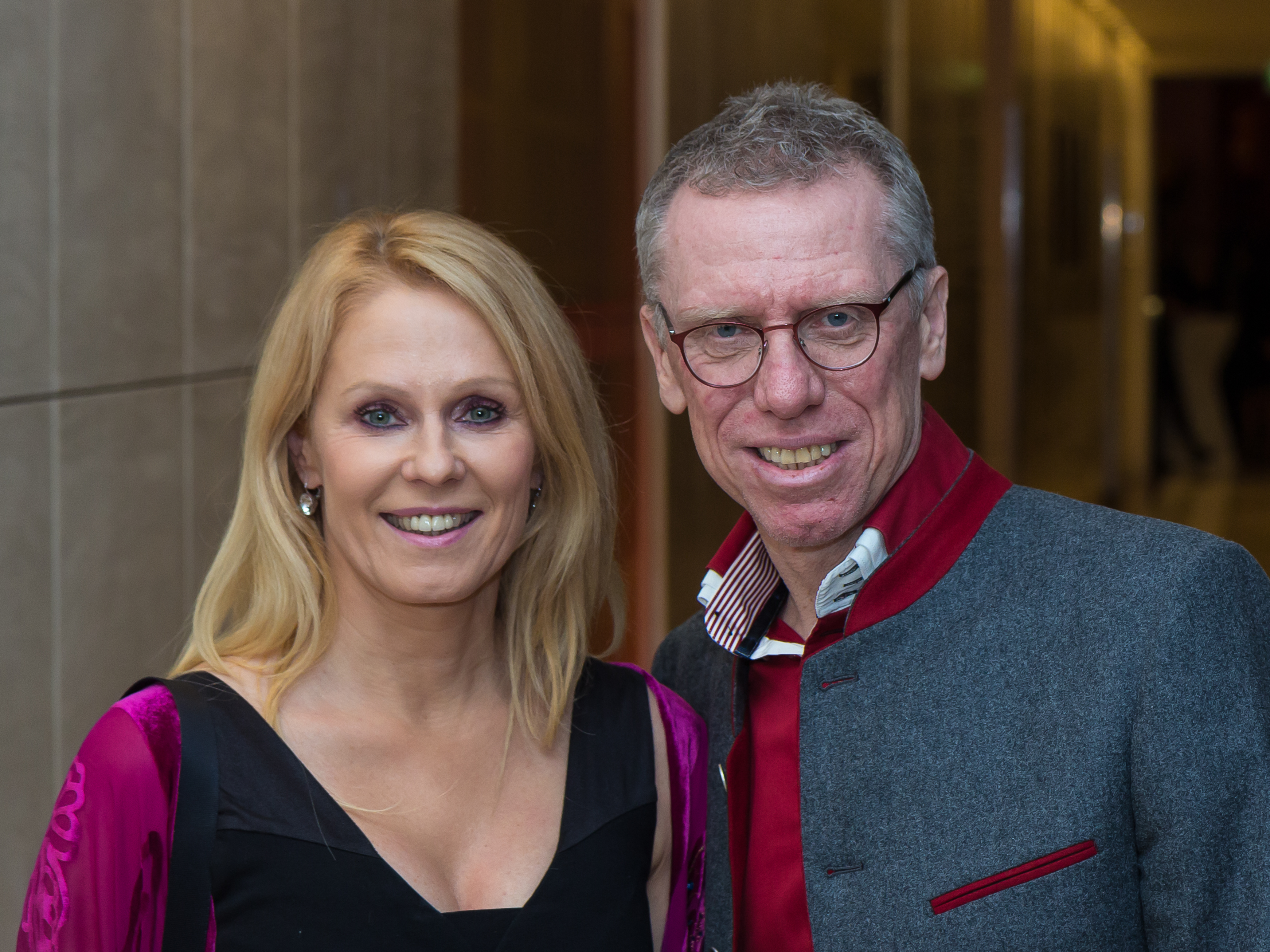 Kölner Charity Sports Night 2017, Peter Stöger mit Lebensgefährtin Ulrike Kriegler